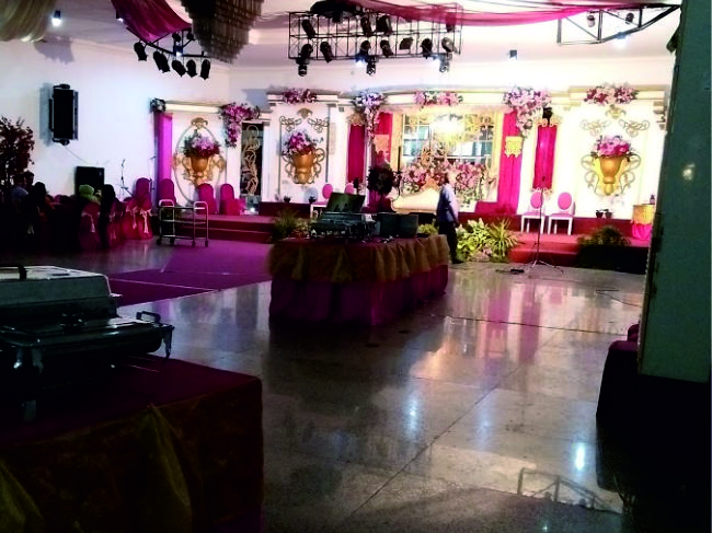 Interior Gedung Flamingo